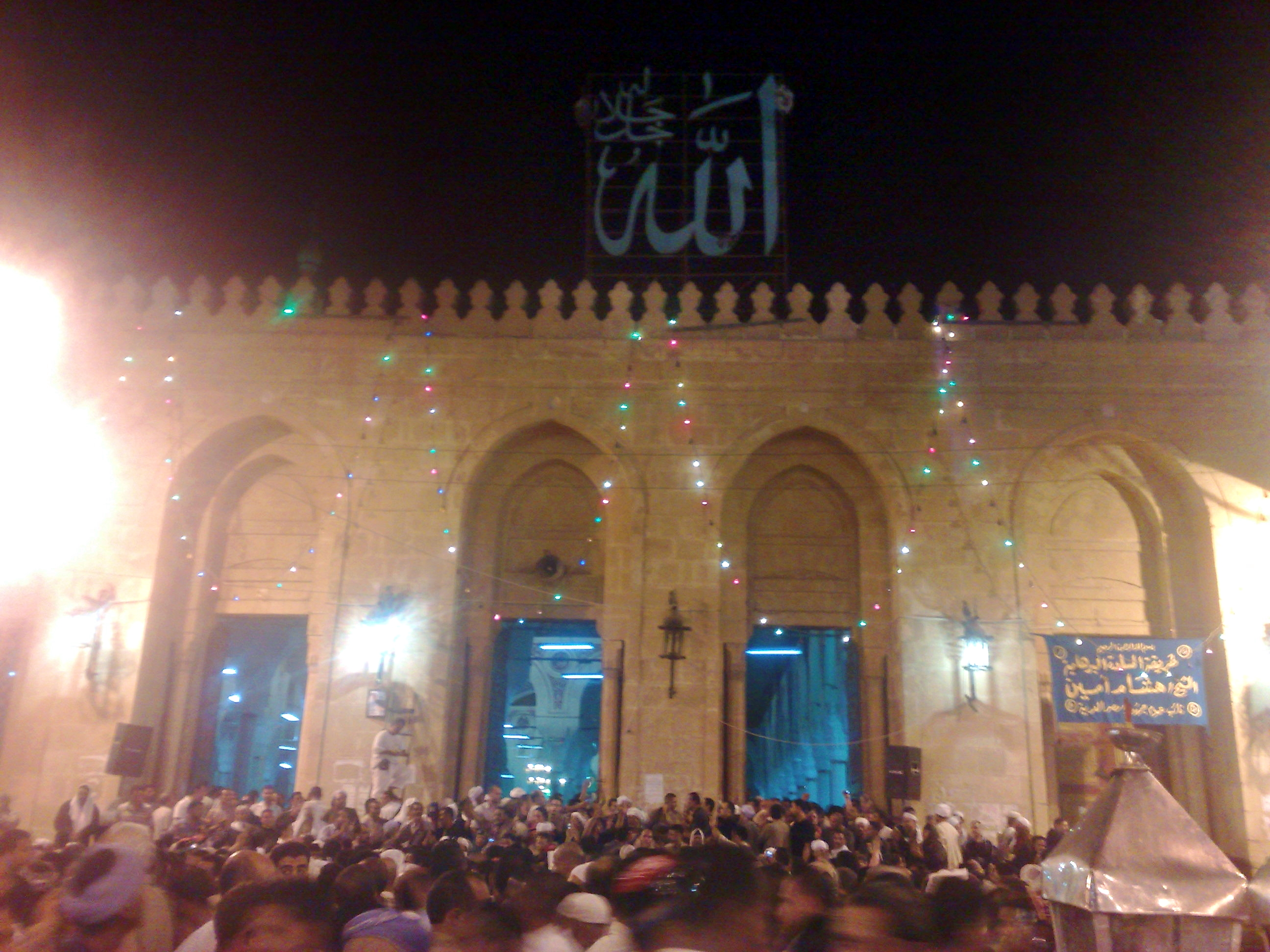 الزحام بمولد العارف بالله إبراهيم الدسوقي